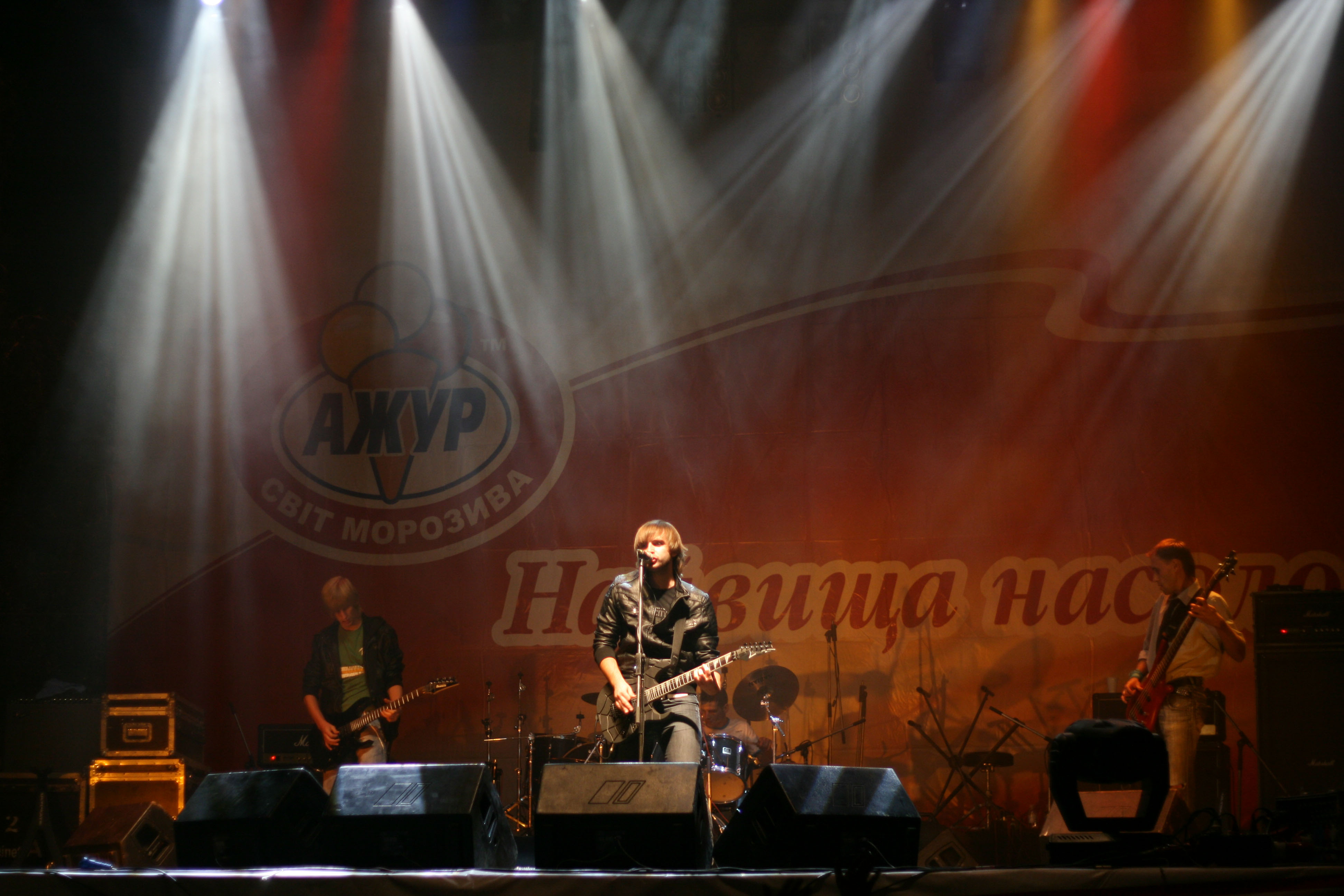 Восьмий День, виступ на день міста в Смілі